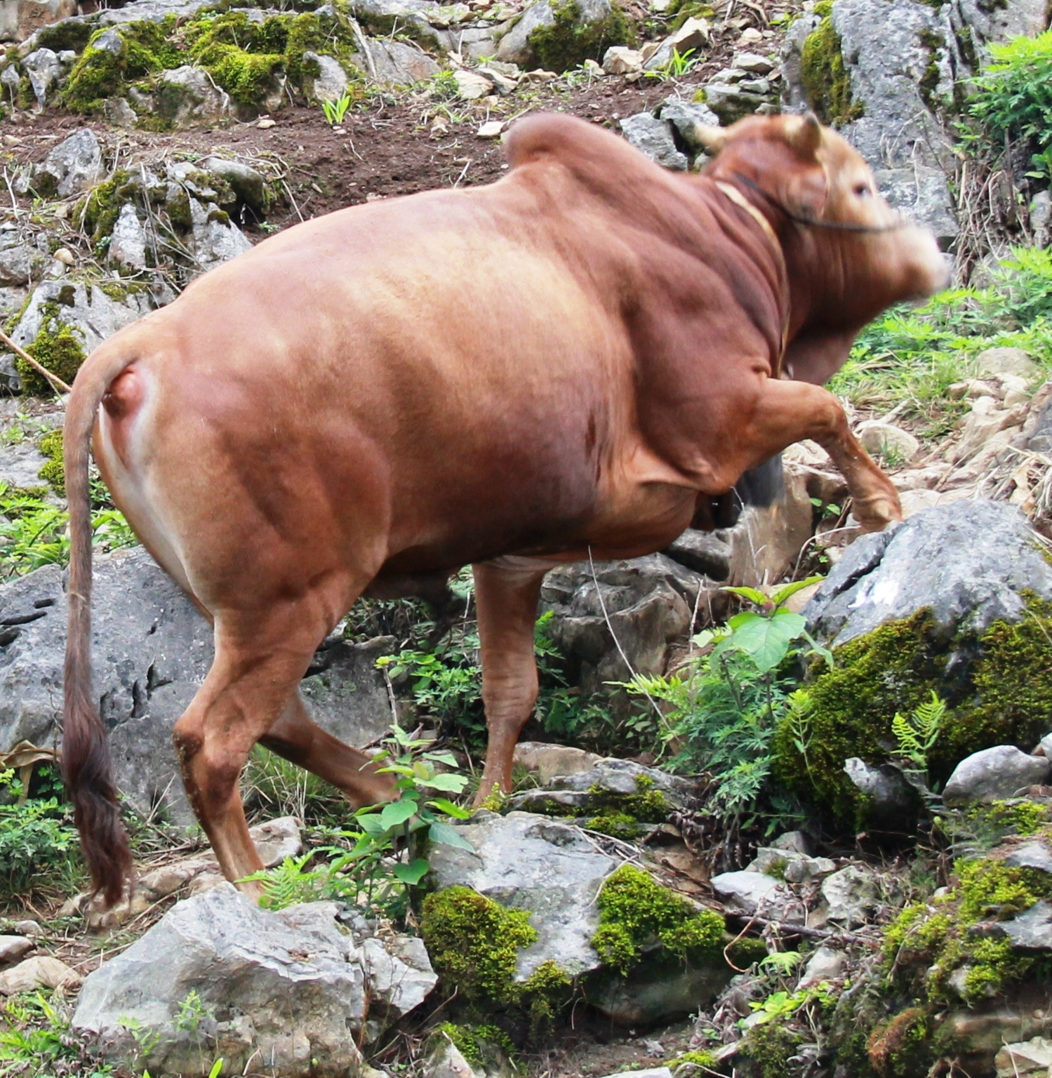 Một con bò vùng rẻo cao tại vùng núi Đông Bắc. Ảnh chụp bằng máy ảnh cá nhân (đã chỉnh sửa)